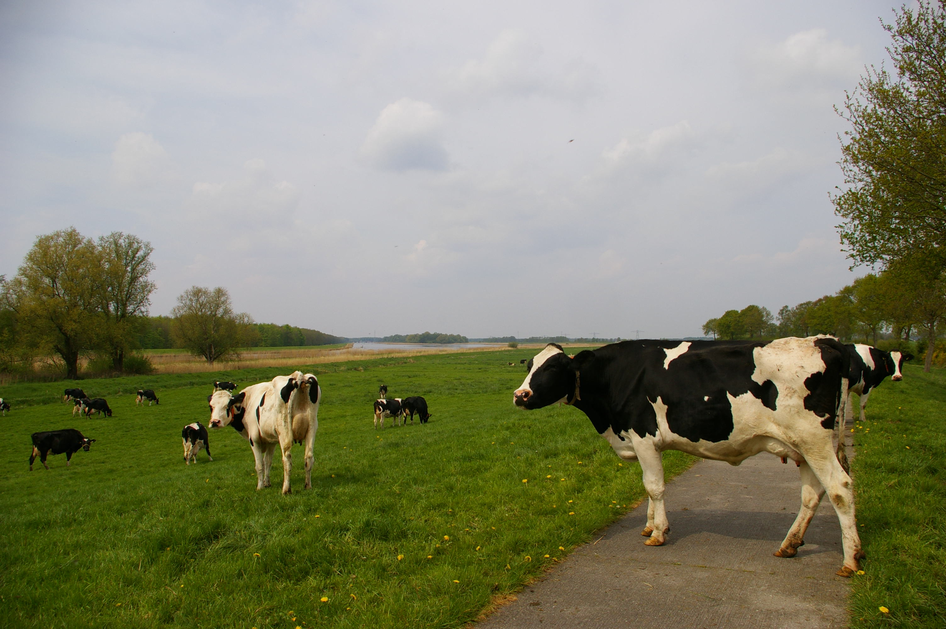 Zuiderzeepad hiking trail, Kadoelermeer, near Vollenhove, Overijssel, used on Zuiderzeepad